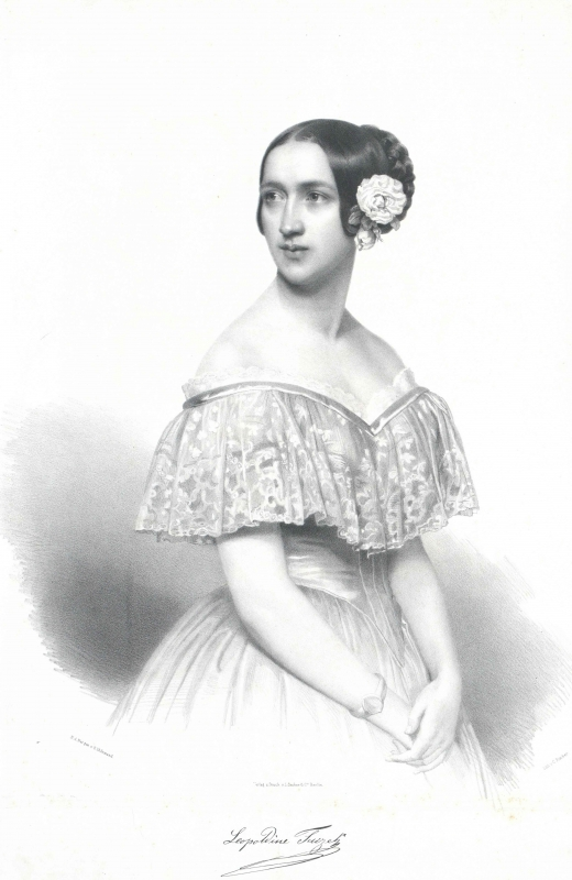 Lithographie